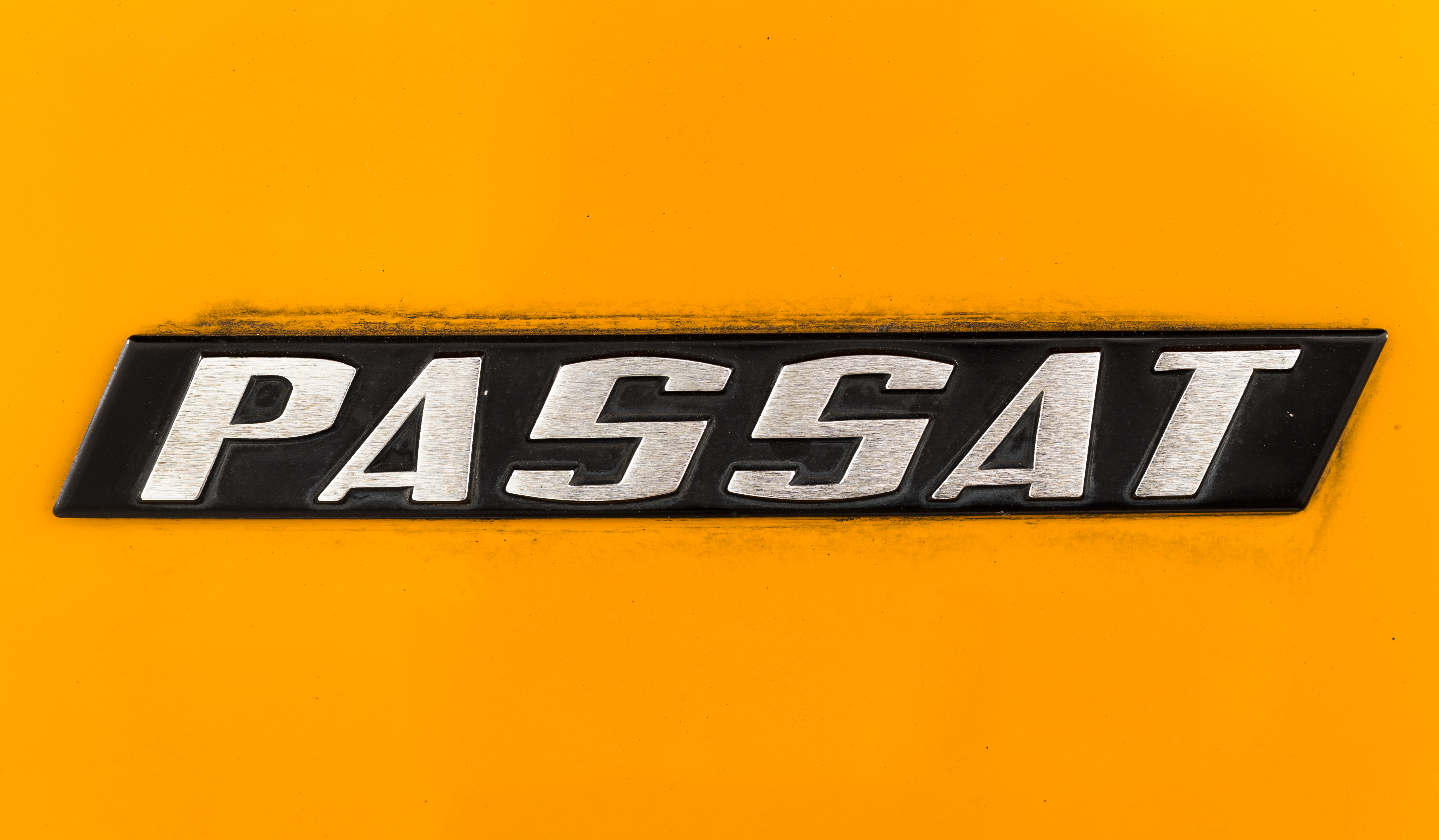 Detailaufnahme Passat Schriftzug.